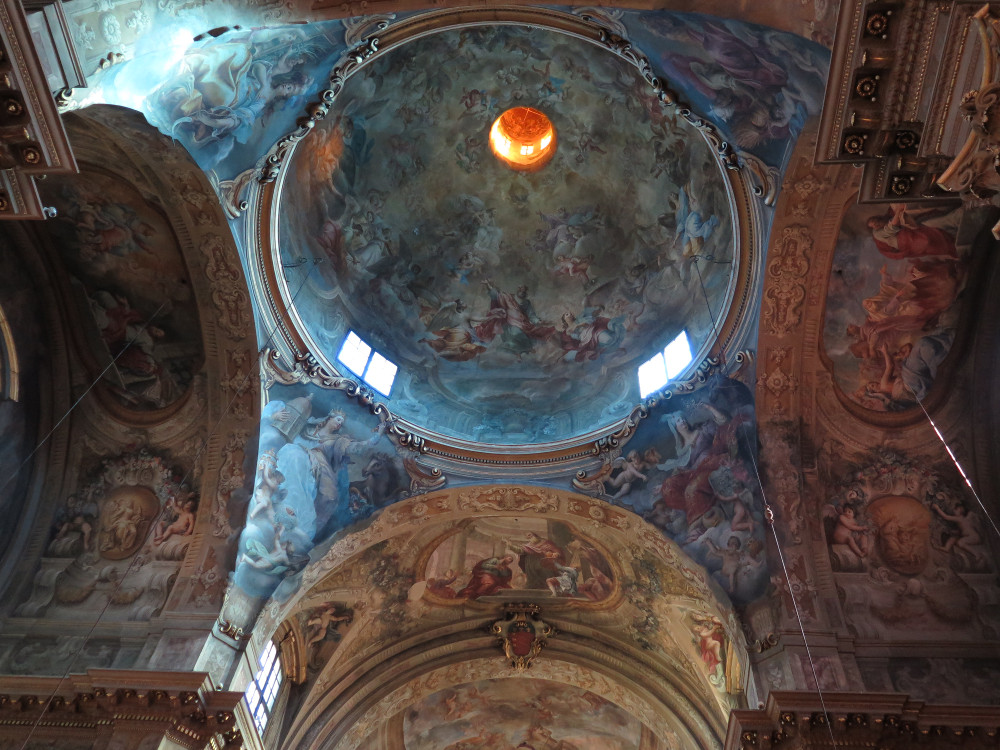 Chiesa di San Paolo Maggiore This is a photo of a monument which is part of cultural heritage of Italy.